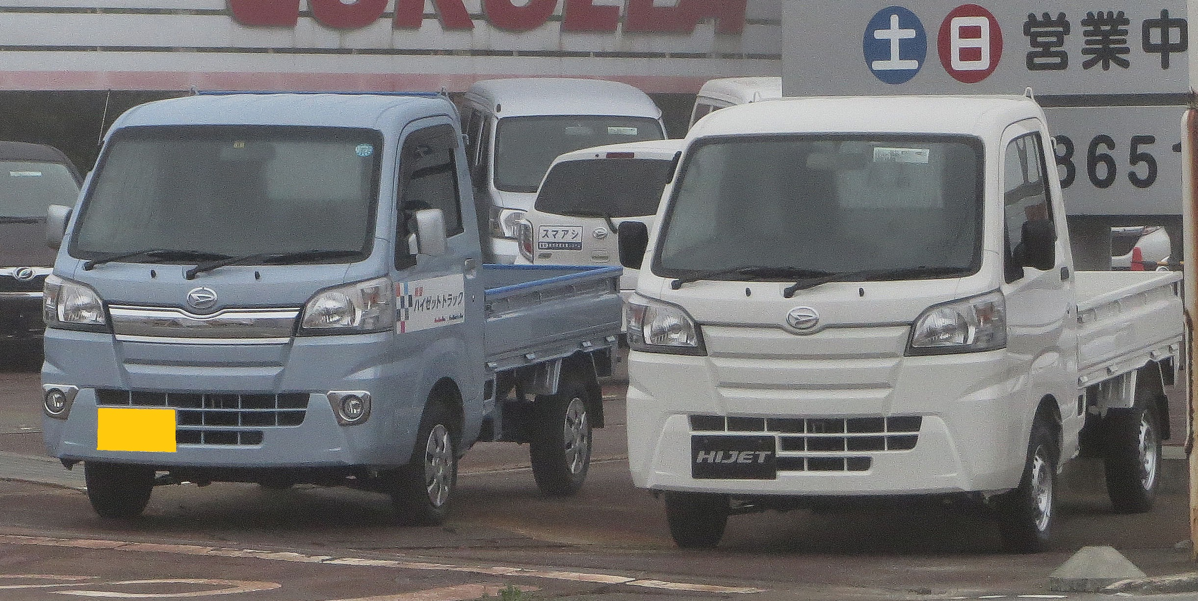 ダイハツ ハイゼットトラック エクストラ&スタンダード